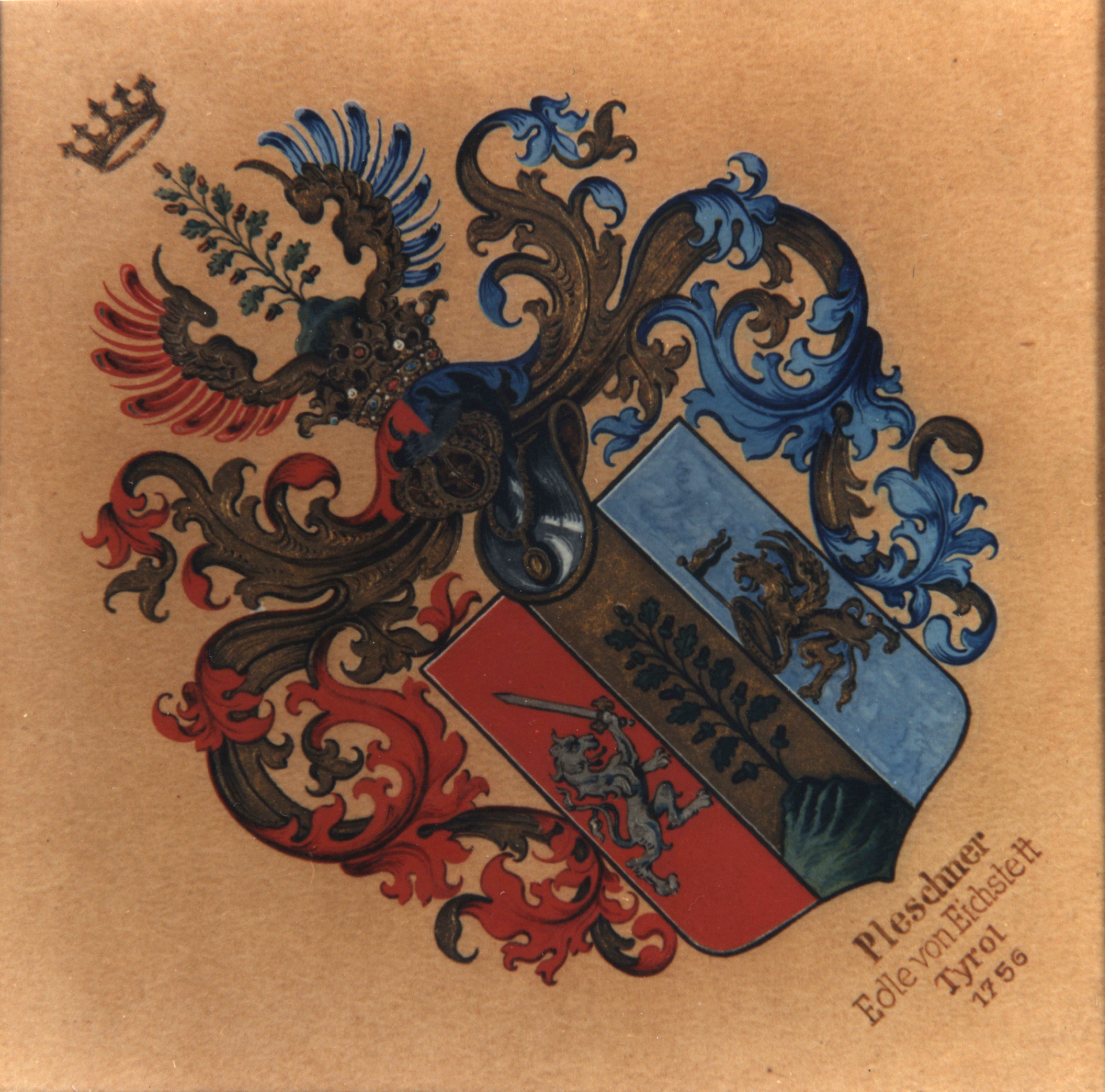 A Pleschner család címere 1756-ból